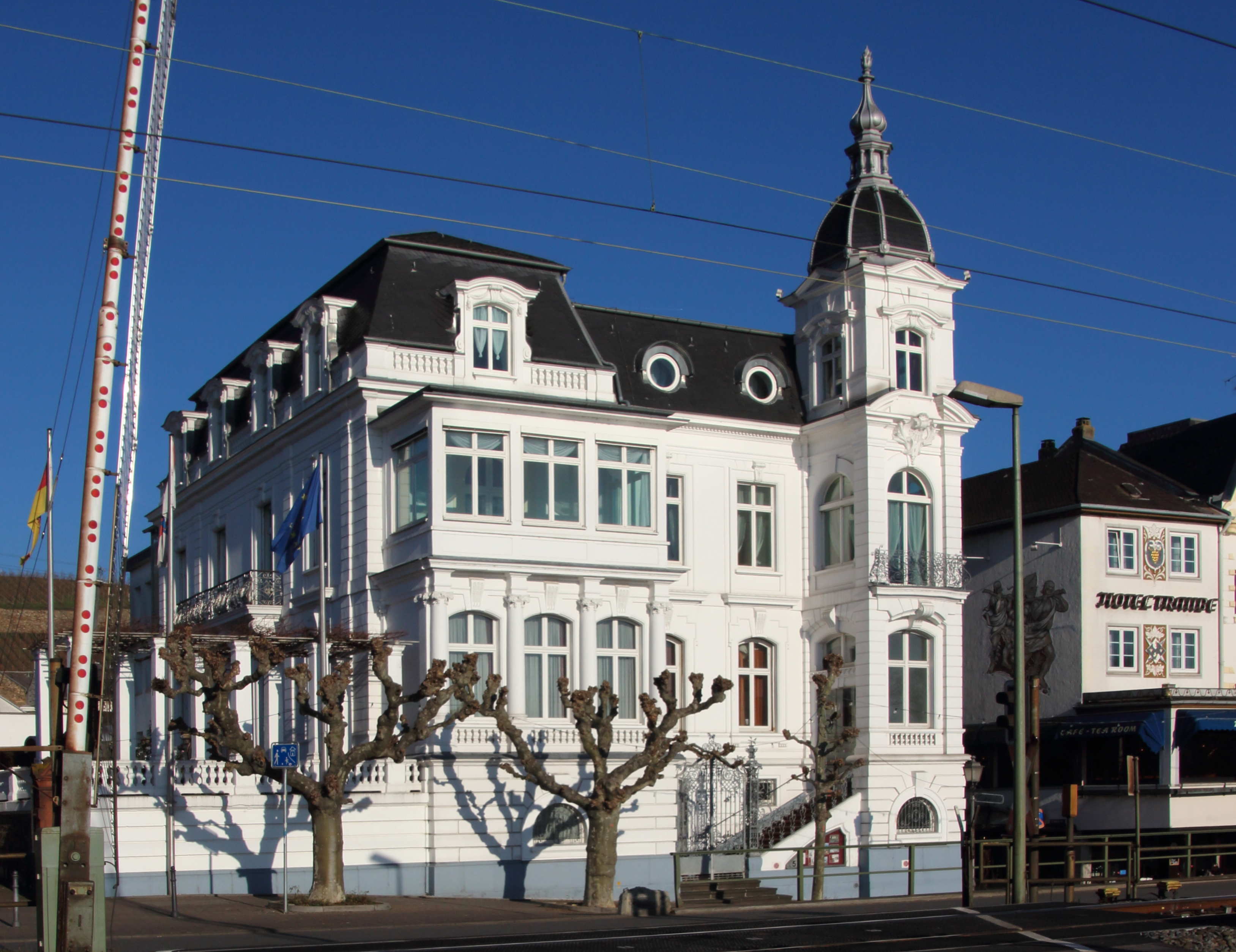 Villa Sturm, erbaut 1891 durch Otto und Elise Sturm. Architekt: Alfred Schellenberg (Wiesbaden). 1942 erwarb der Landkreis Rheingau das Gebäude, in das 1945 das Landratsamt und später eine Verwaltungsaußenstelle des Rheingau-Taunus-Kreises bis 1996 einzog. Seitdem in verschiedenem Privatbesitz. Rheinstraße 5, Rüdesheim am Rhein.